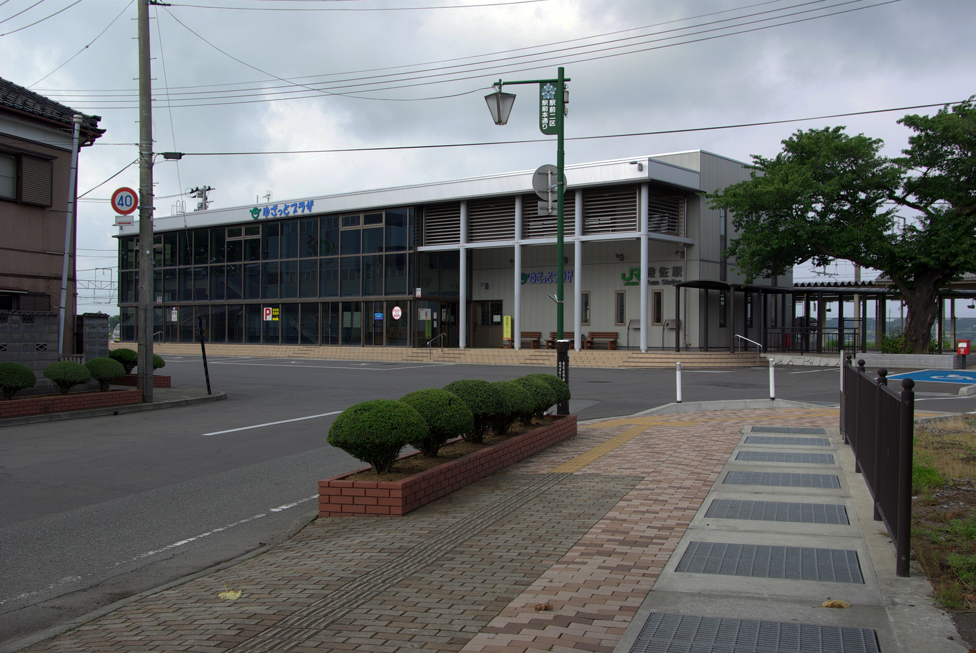 羽越本線遊佐駅